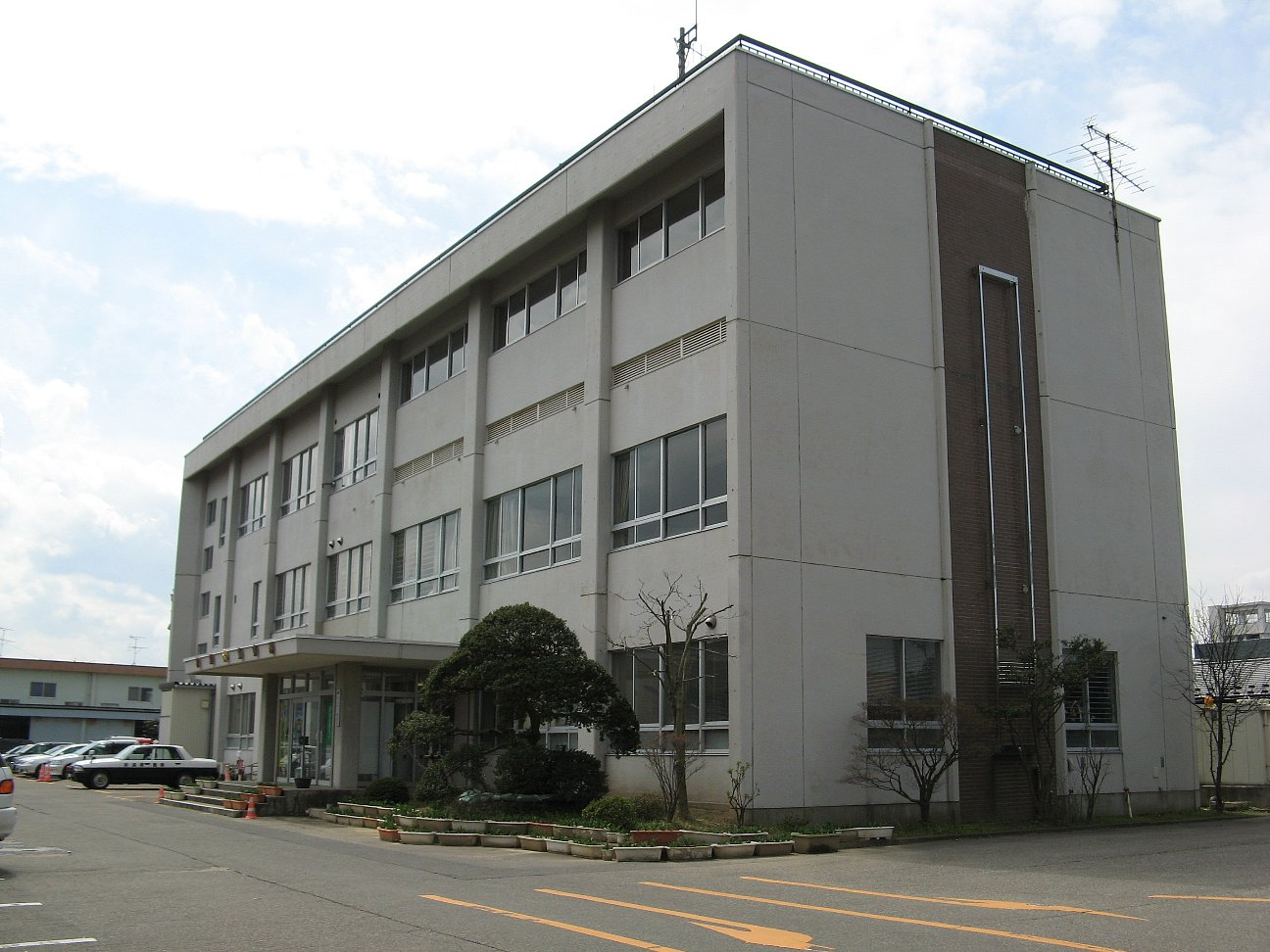 秋葉警察署（旧・新津警察署）